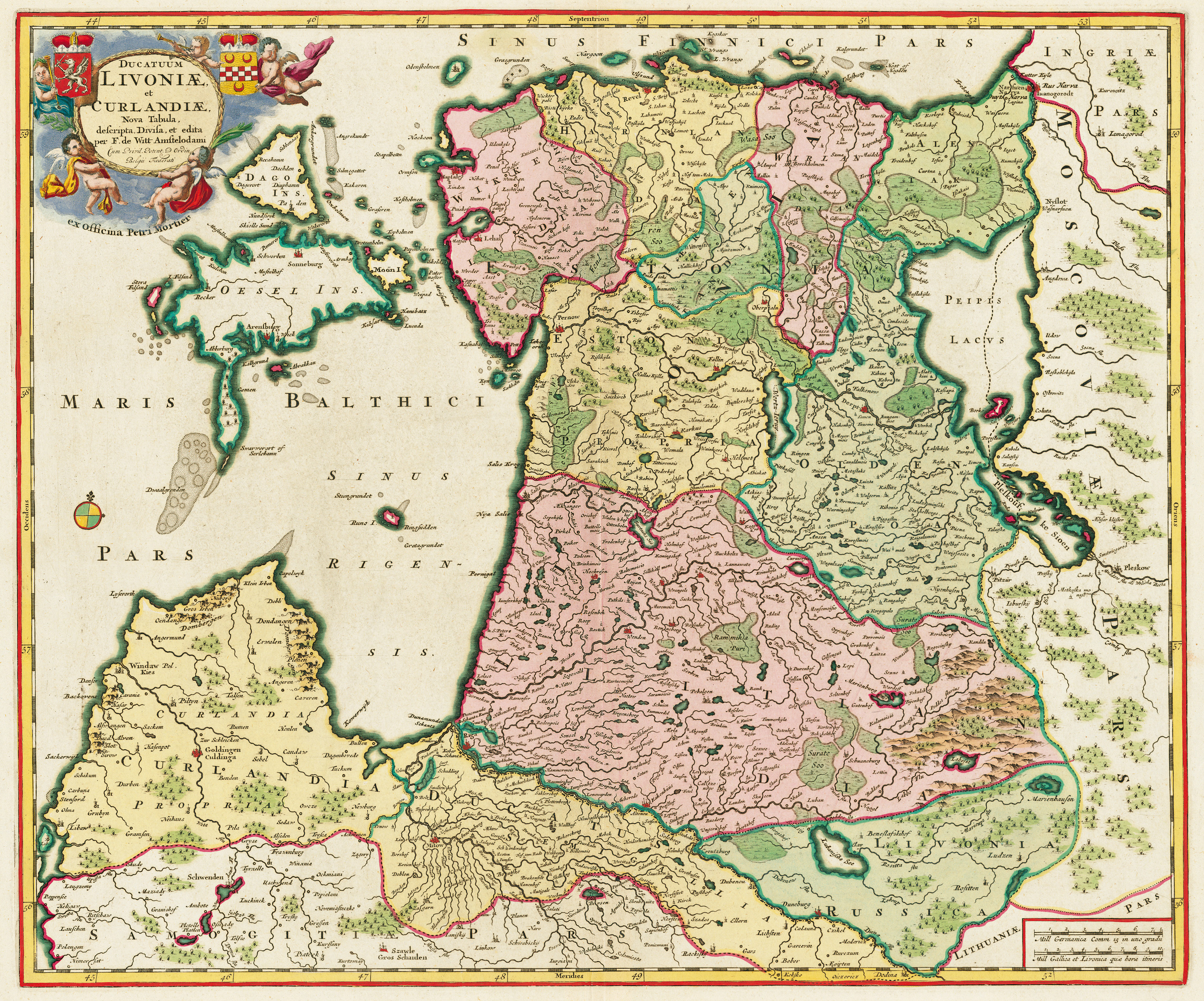 title=Ducatuum Livoniæ et Curlandiæ Nova Tabula ...; size=41x49 cm